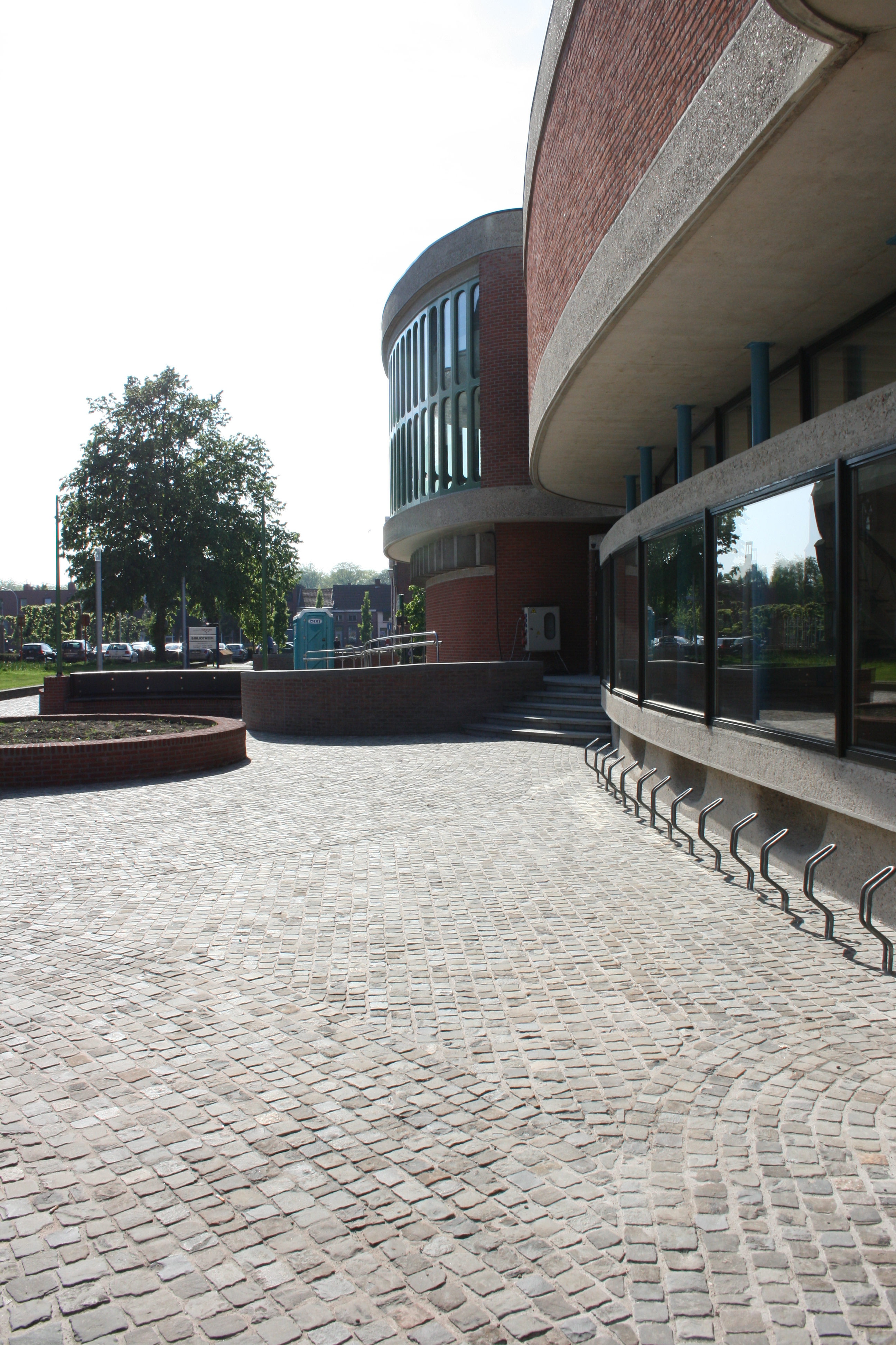 wandelplein naast de gemeentelijke bibliotheek Schoten